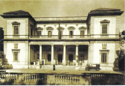 Fotografía de la 'Hacienda San José' a principios del siglo XX, Málaga, España.